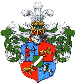 Novosiltsovi suguvõsa aadlivapp (Eestimaa)